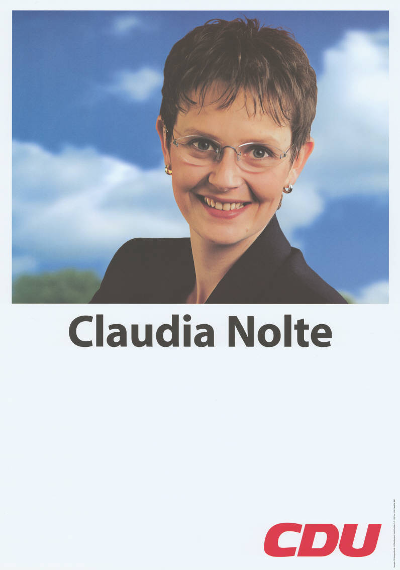 Claudia Nolte CDU Abbildung: Porträtfoto Kommentar: Datierung nicht eindeutig Plakatart: Kandidaten-/Personenplakat mit Porträt Auftraggeber: CDU-Bundesgeschäftsstelle, Hauptabteilung Öffentlichkeitsarbeit, Bonn Objekt-Signatur: 10-031 : 823/1 Bestand: CDU-Plakate (10-031) GliederungBestand10-18: Personenplakate Lizenz: KAS/ACDP 10-031 : 823/1 CC-BY-SA 3.0 DE